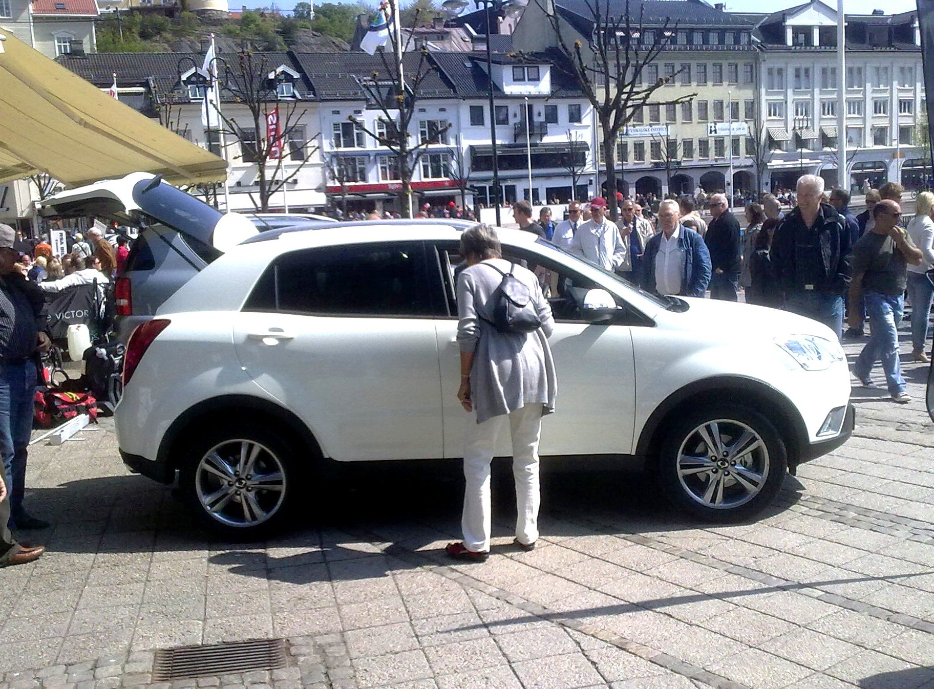 Arendal Bilmesse 2011 - Ssangyong Korando premiere